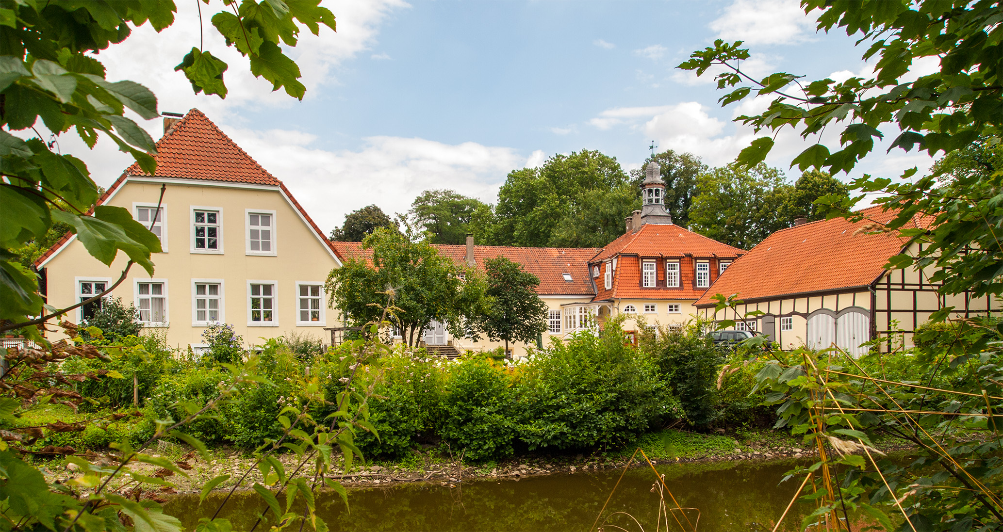 Gut Eckendorf, Leopoldshöhe (Kreis Lippe)This is a photograph of an architectural monument.